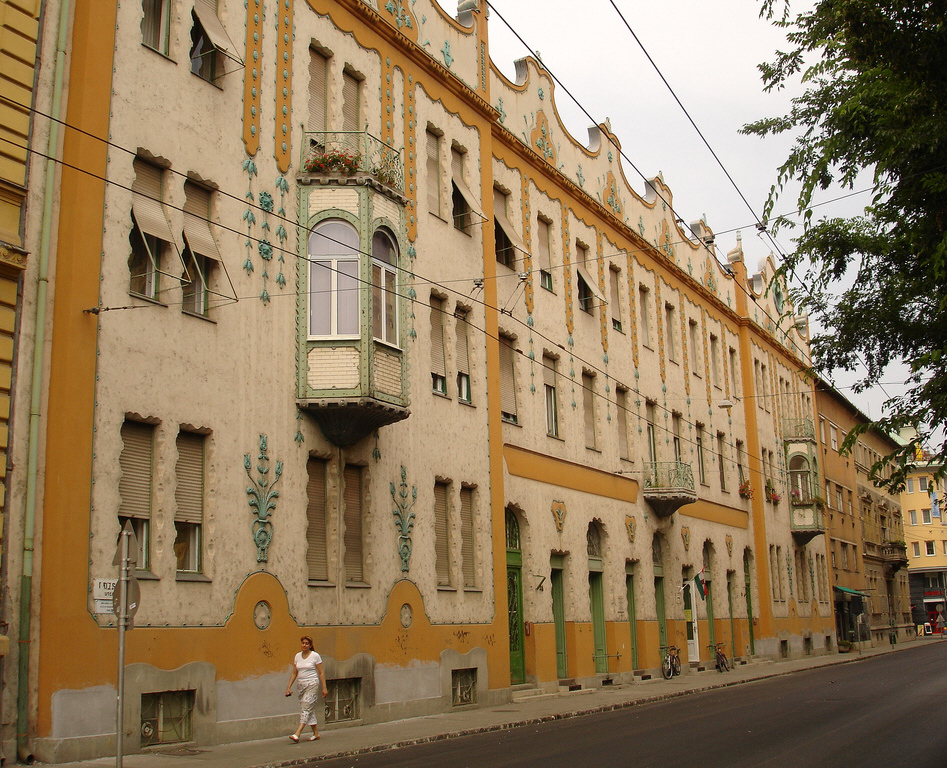 Szeged, Dózsa György utca 2. kivitelező: Erdélyi és Kopasz cég 1911. Szerkezettervek: Erdélyi Mihály, homlokzattervezője: Lechner Ödön, 1911